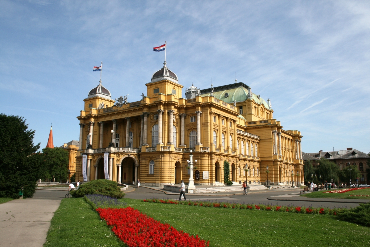 Hrvatsko narodno kazalište u Zagrebu